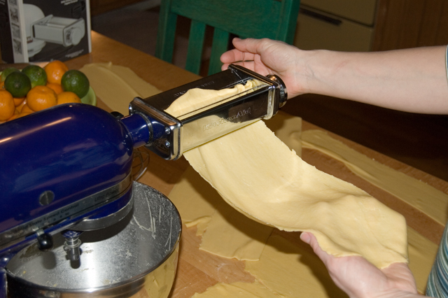 pasta making